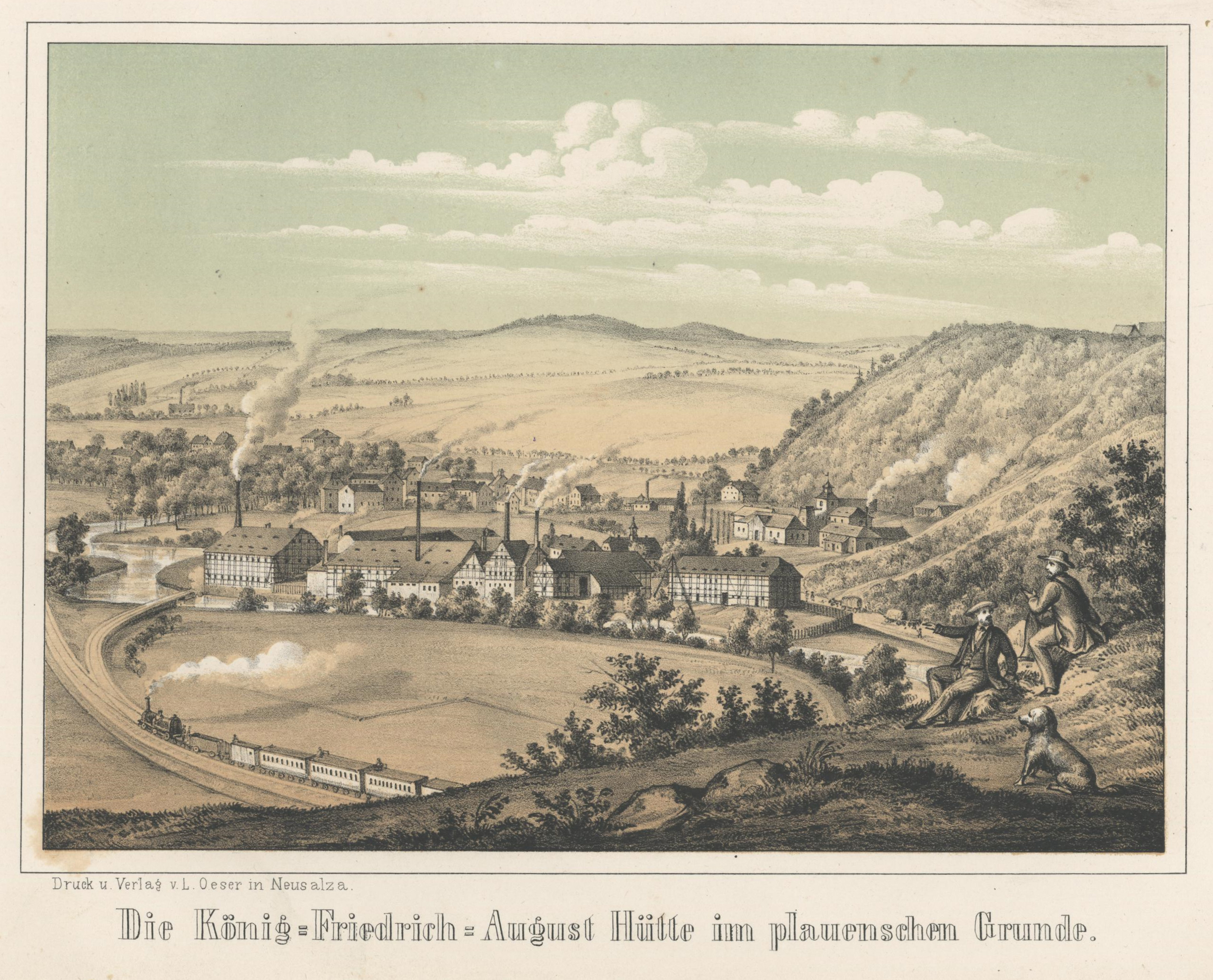 Die König-Friedrich-August Hütte im plauenschen Grunde aus: Album der Sächsischen Industrie Erster Band